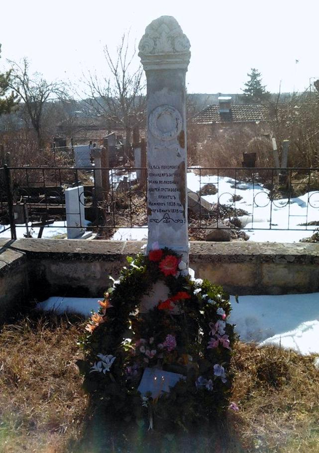 Надгробен паметник на полковник Андрей Густавович Принтц, командир на 140-ти Зарайски полк, починал от коремен тиф на 8 март 1878 г. Погребан в гробщето на с. Пороище.